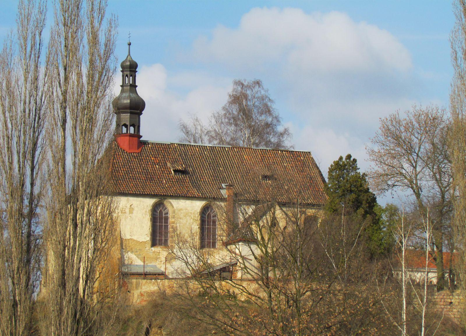 Kostel sv. Mikuláše v Plzni